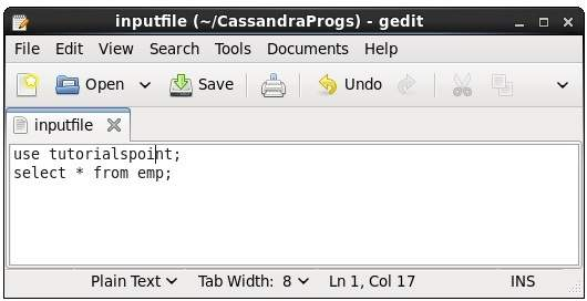 Монгол: файлд оруулах